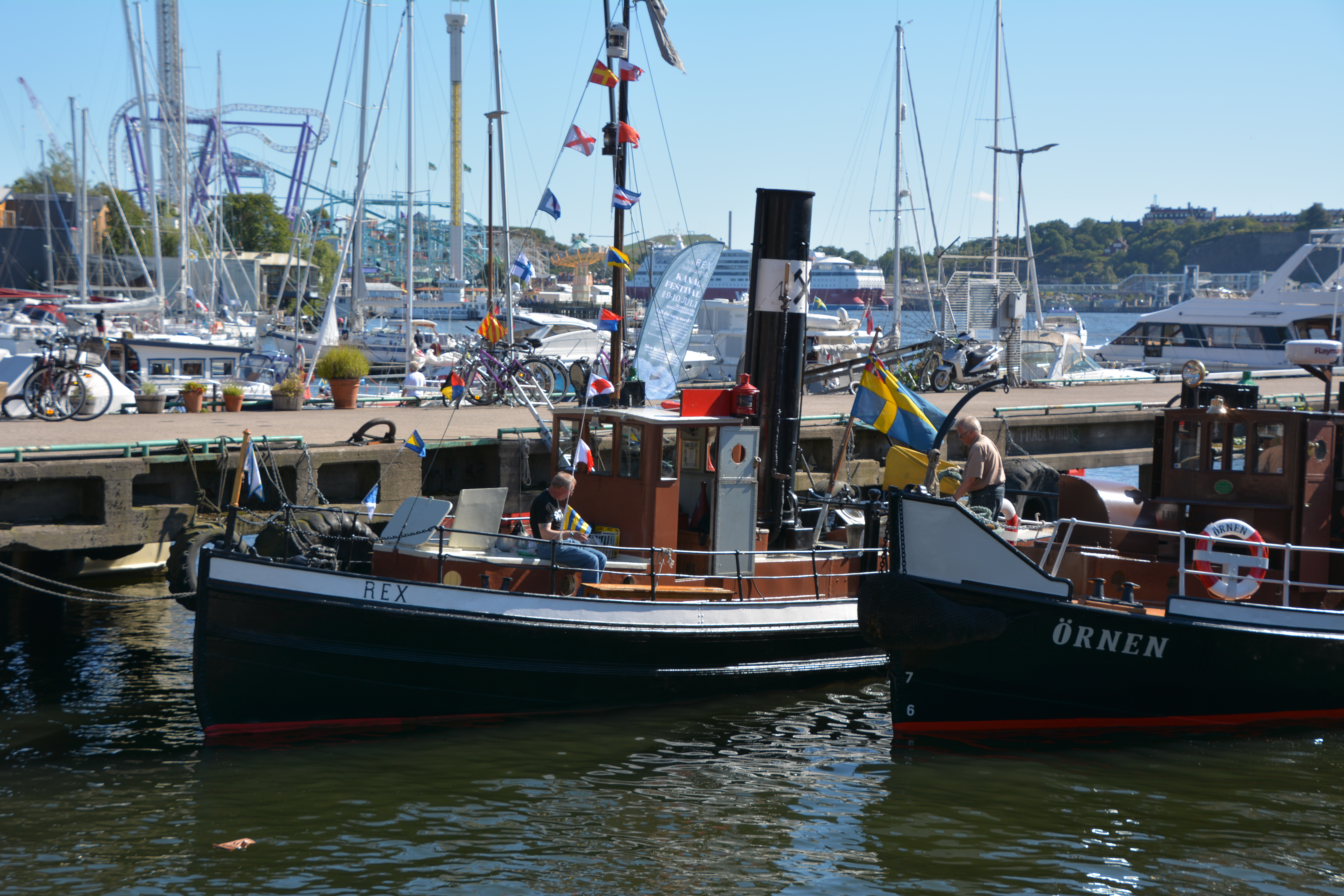 Bogserbåten Rex i Djurgårdshamnen 2015 under Stockholm Steam This is an image of a protected Swedish ship, with call sign SJIH .